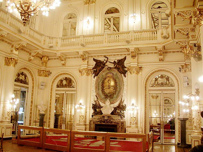 Salón Blanco de la Casa Rosada. En él se realizan los actos de gobierno de mayor trascendencia, siendo el más relevante el de recepción, por parte de cada Presidente de sus atributos de mando: la Banda y el Bastón Presidencial. También se realizan las ceremonias del Juramento de los Ministros y Secretarios de Estado; las presentaciones de Cartas Credenciales de los Embajadores extranjeros, acreditados en la Argentina; las recepciones de invitados especiales; las firmas de tratados internacionales; los discursos y mensajes de mayor trascendencia, dirigidos por el Presidente de la Nación y ocasionalmente ,ante el fallecimiento de personalidades de relevancia nacional, como salón velatorio. El testero del Salón presenta un importante frente ornamental en forma de chimenea, sobre la que se encuentra emplazada la tradicional escultura que representa el busto de la Patria, obra del artista italiano Ettore Ximenes y realizada en mármol de Carrara. Arriba del Busto se encuentra el Escudo Nacional en bronce, sobre placa de mármol. Coronándolo, se ven dos ángeles realizados en madera patinada, cuyas manos sostienen trompetas de gloria. Todo este conjunto ornamental fue comprado a la Casa Forest de París en el año del Centenario. En el ángulo derecho, se encuentra el busto del General San Martín, hecho por el filipino Félix Pardo de Tavera. Desde el 4 de Agosto de 1993, en el ángulo izquierdo está colocado el busto del General Manuel Belgrano, realizado por el escultor argentino Juan Carlos Ferraro.